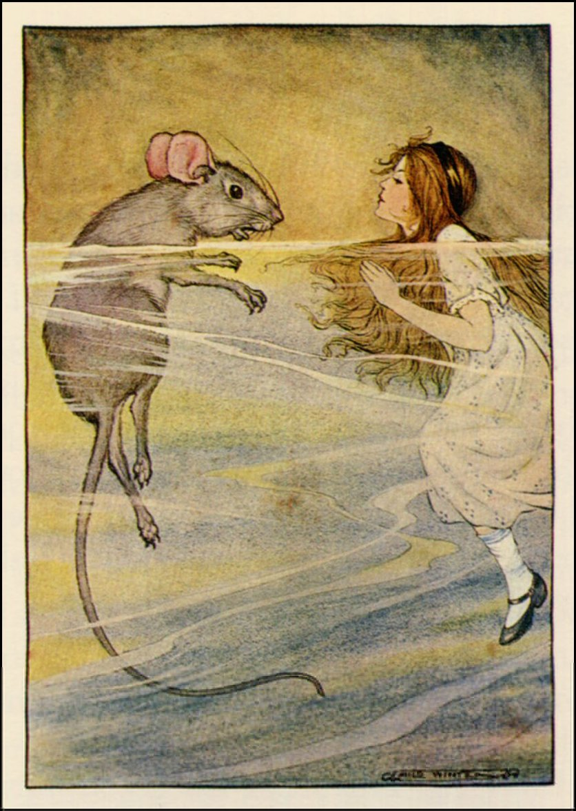 Мило Уинтер. Иллюстрация к книге